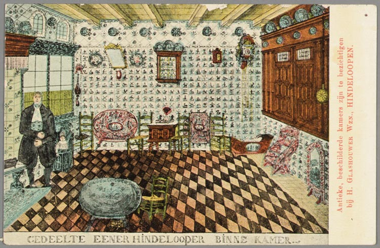 Werk van de Hindelooper schilder Hendrik Lap